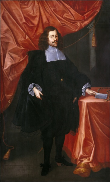 vévoda krumlovský